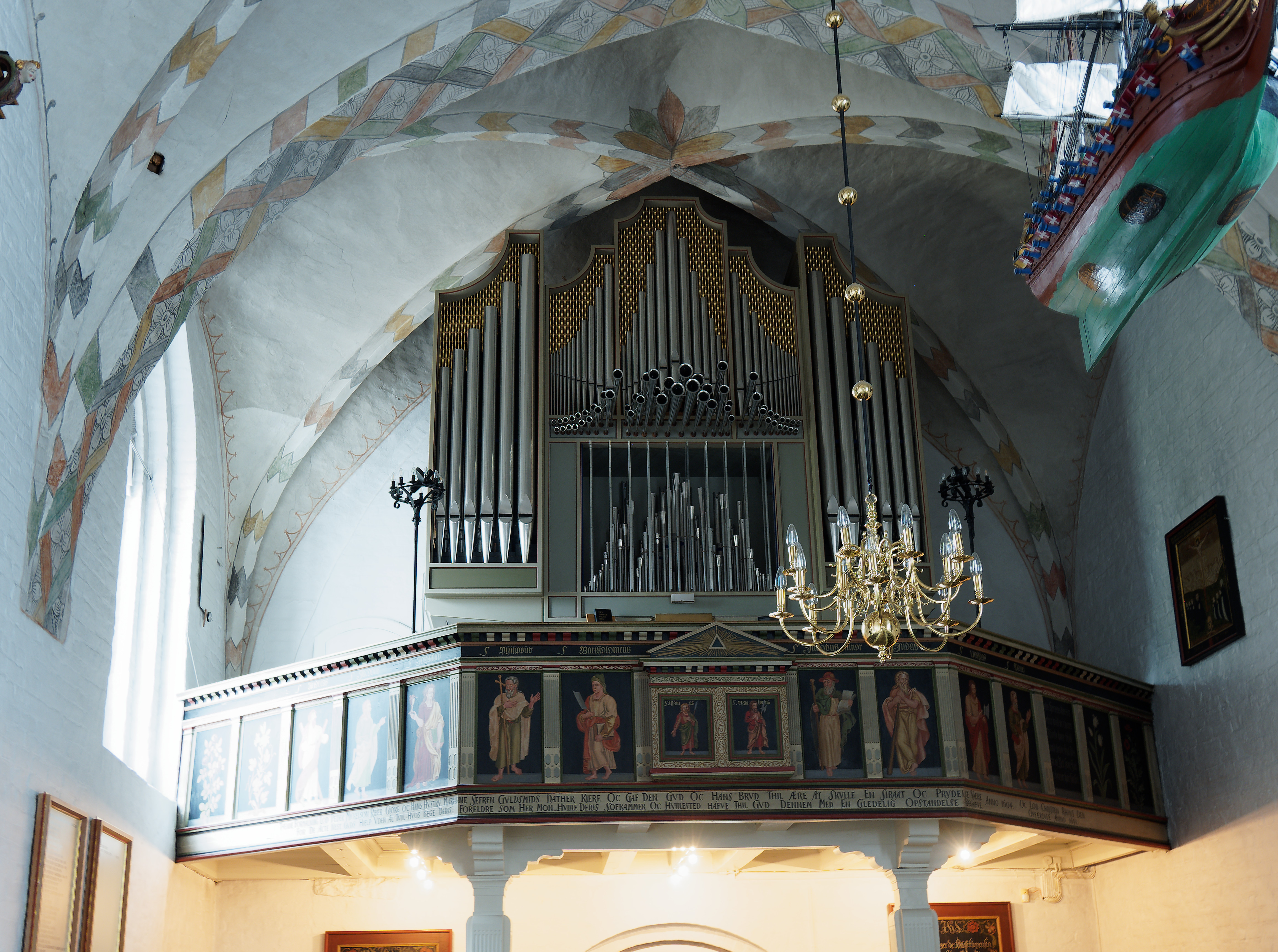 Sæby (Frederikshavn Kommune), errichtet im 13 Jahrhundert, Orgel und Orgelbühne mit Heiligenbildern.